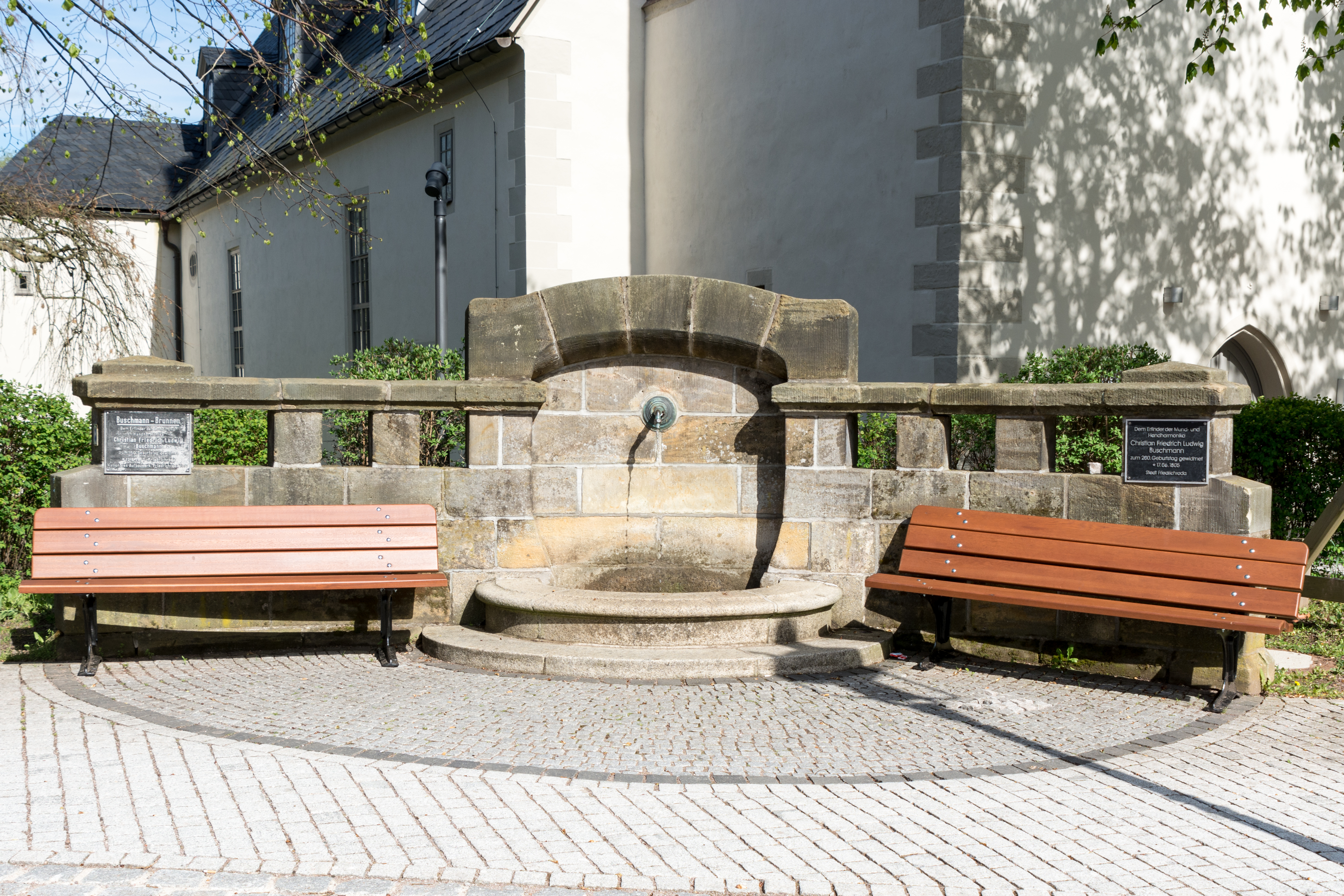 Buschmann-Brunnen in Friedrichroda. This is a photograph of an architectural monument.It is on the list of cultural monuments of Friedrichroda